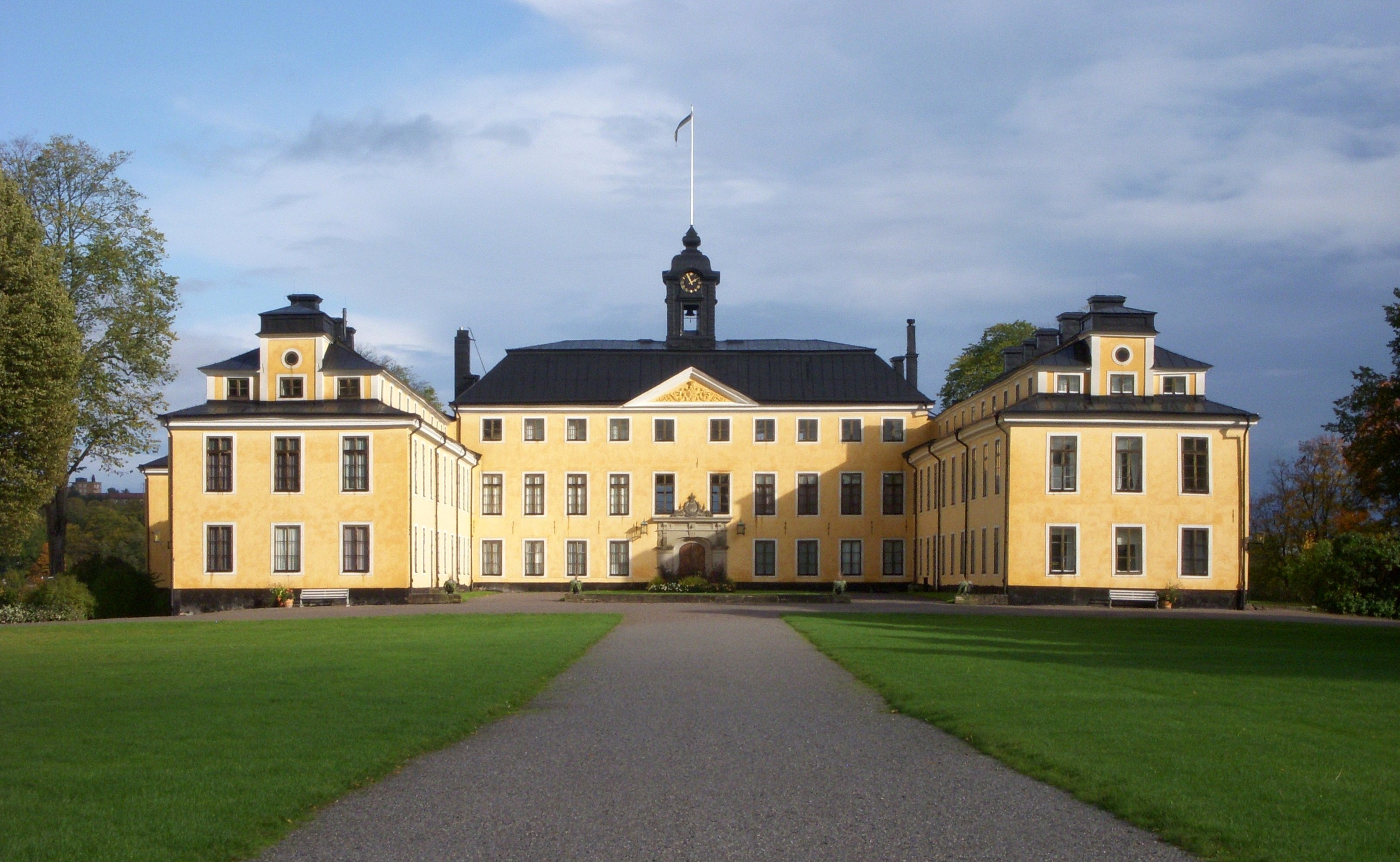 Ulriksdals slott mot väst